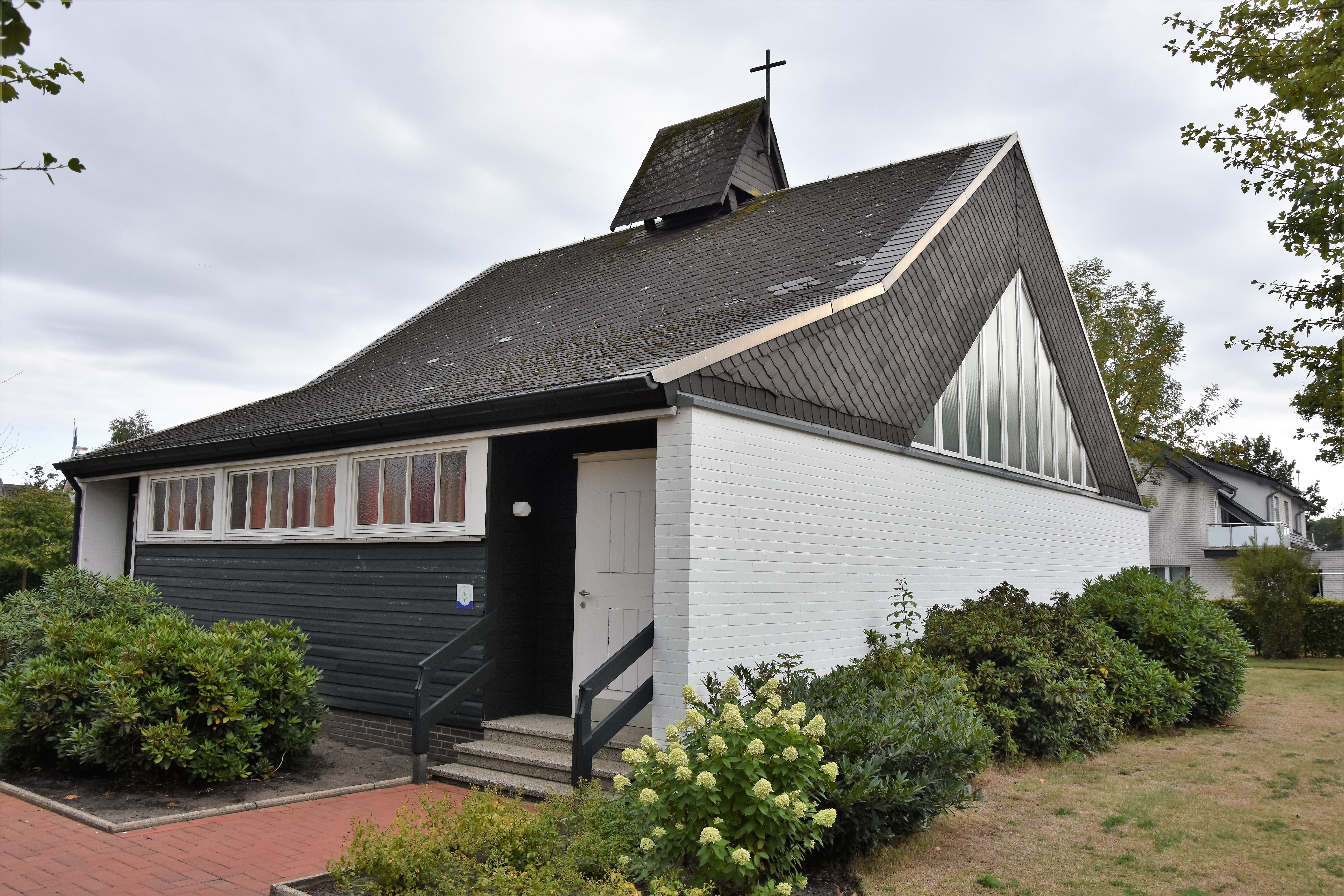 Thomaskapelle in Bramsche-Lappenstuhl